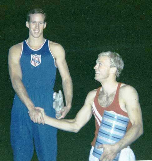 Dick Railsback and Hans Lagerqvist in Stockholm